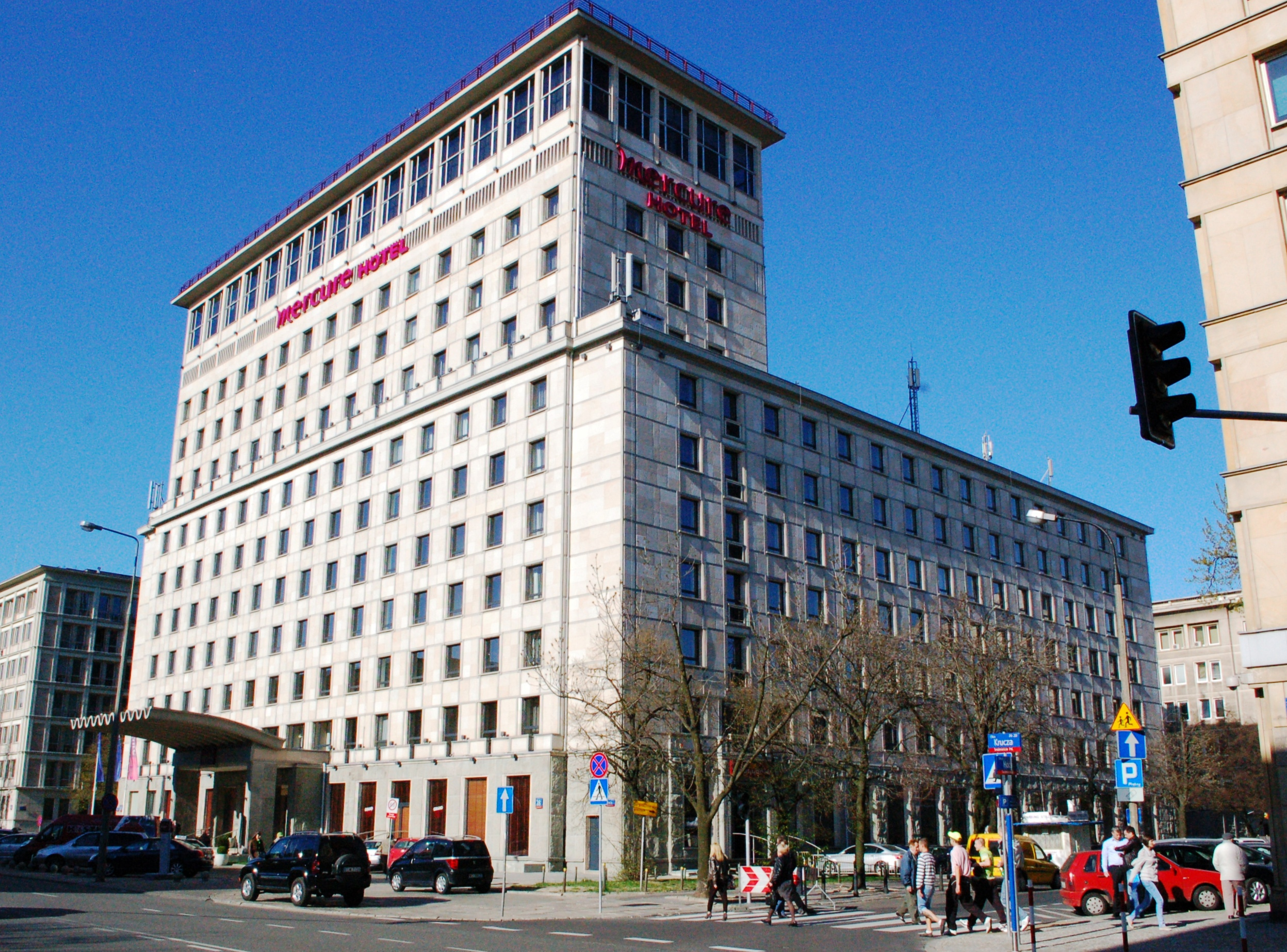 Grand Hotel Warschau